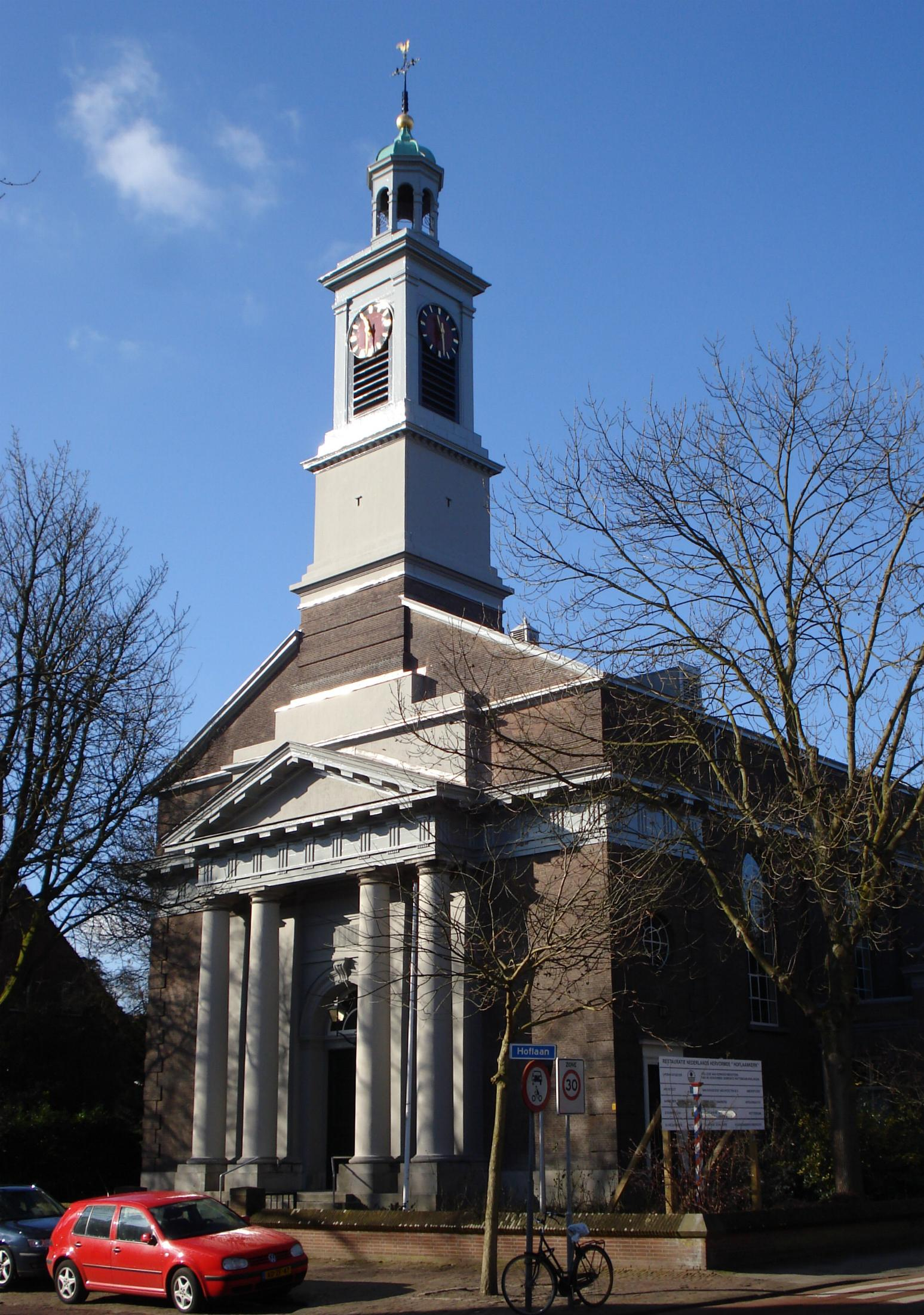 Rotterdam, Kralingen. Hoflaankerk. Rijksmonument.